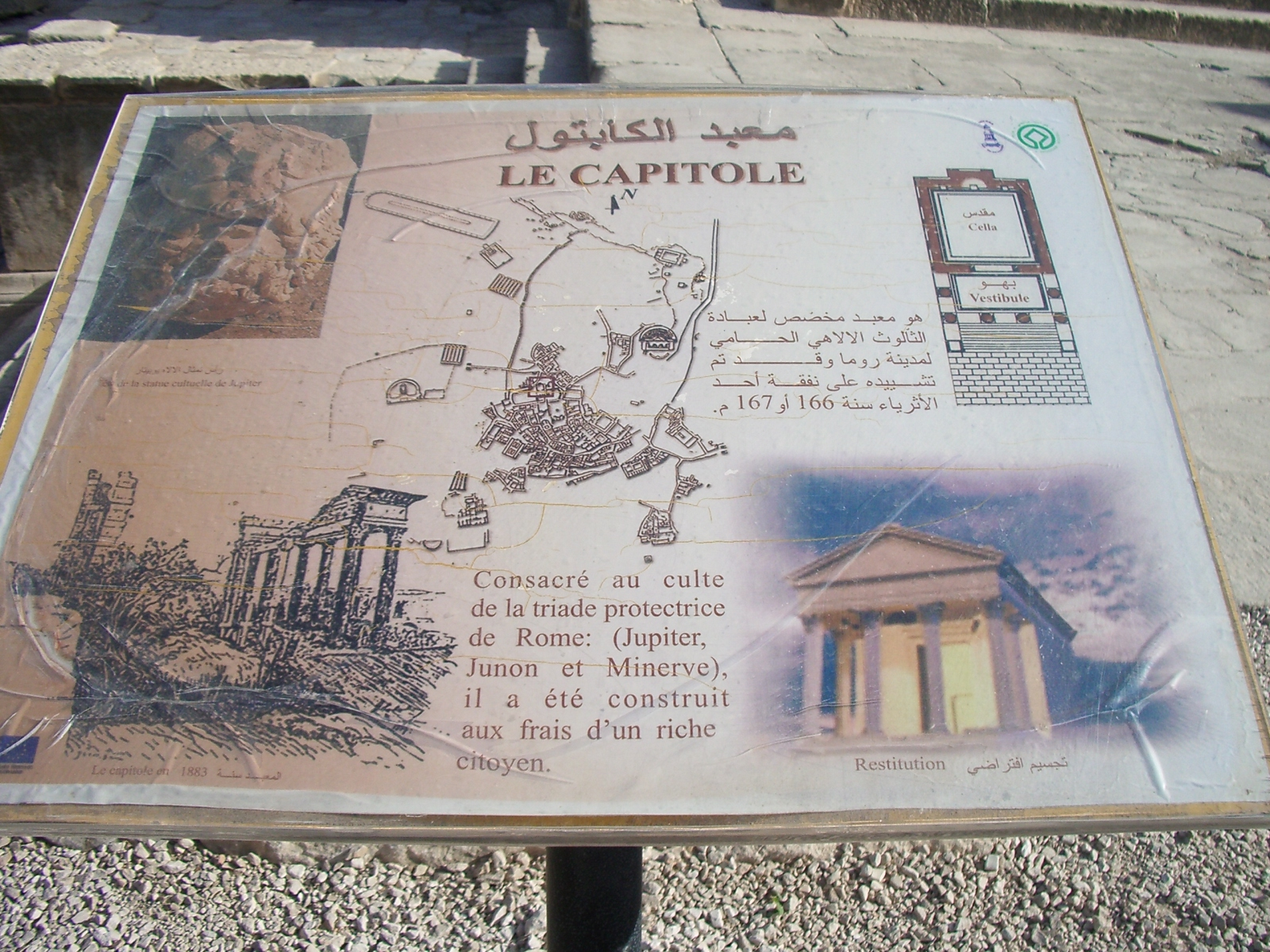 Dougga capitoli